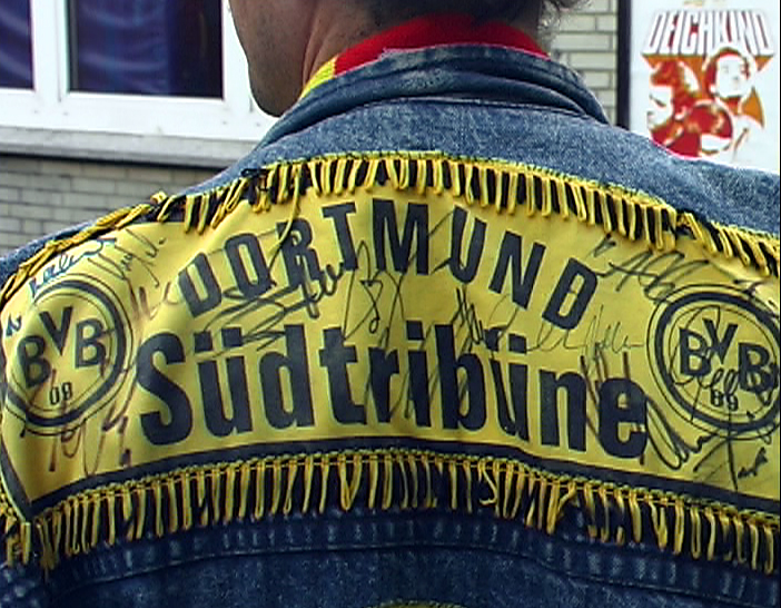 Fan Borussia Dortmund "Kutte"